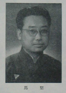 中國人民政治協商會議第一屆全體會議代表